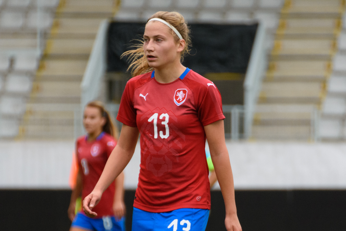 Michaela Dubcová vs Slovenia